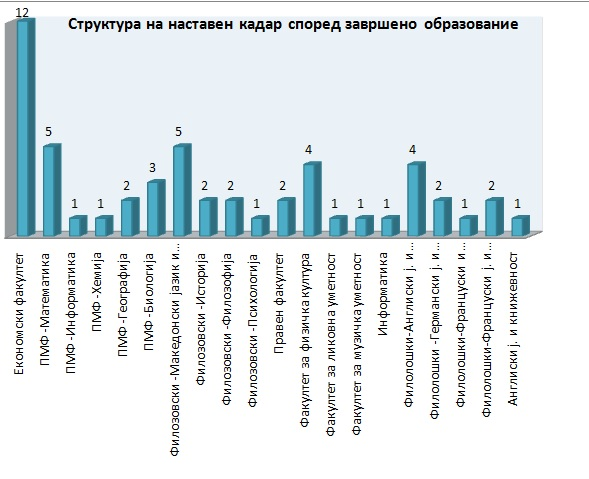 teachers table